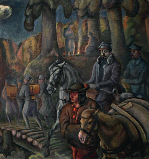 Obraz olejny "Haller i Minkiewicz w Karpatach". Autor: Władysław Roguski.